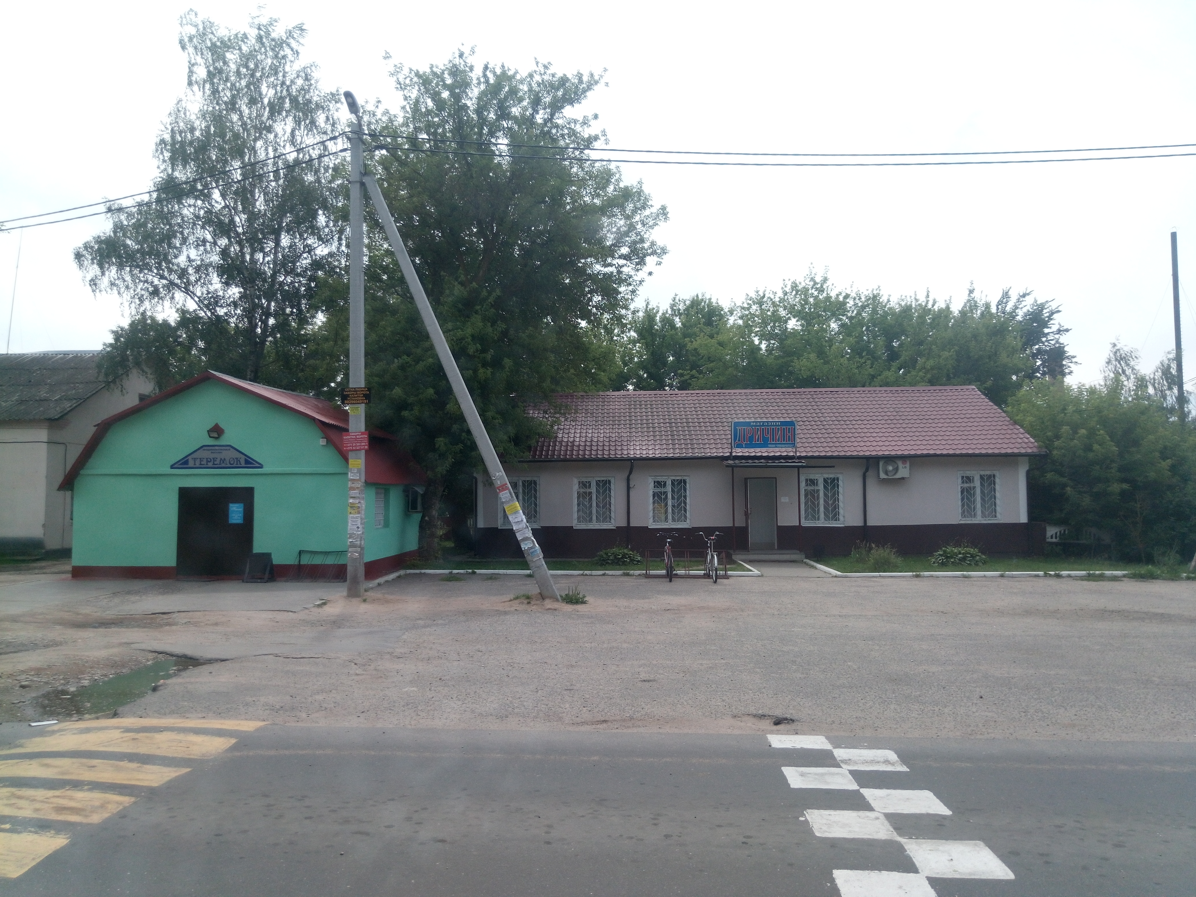 крама «Дрычын»